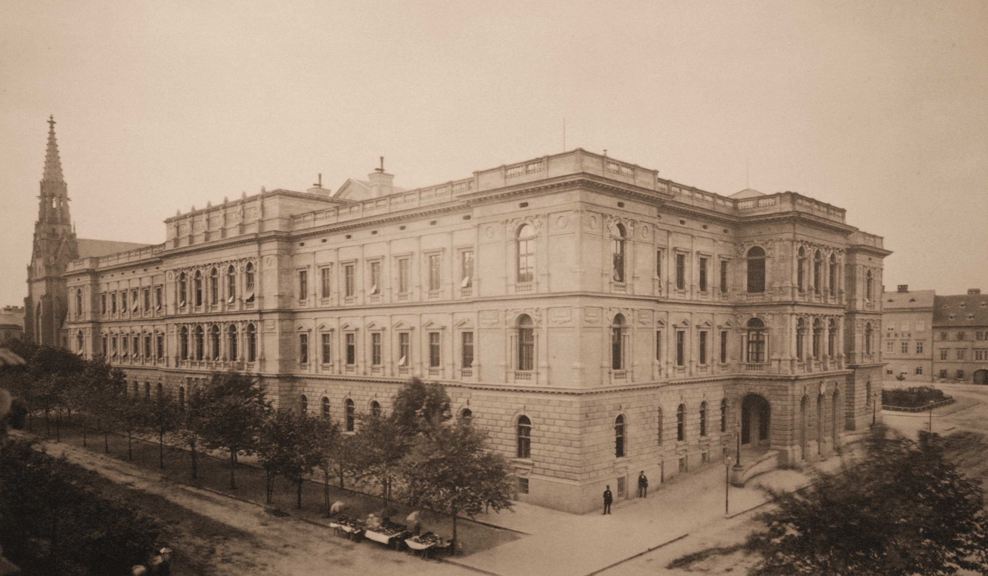 Jižní průčelí budovy Moravského zemského sněmu. Fotografie z roku 1878, foto ateliér Kunzfeld. Pořízeno při mimořádné jednodenní expozici "Zemská sněmovna v zrcadle své doby" vystavující artefakty z roku 1878, které byly nalezeny 4. listopadu 2014 při stavebně historickém průzkumu ve schránce za závěrečným kamenem budovy Ústavního soudu, původně Moravského zemského sněmu ([1]).